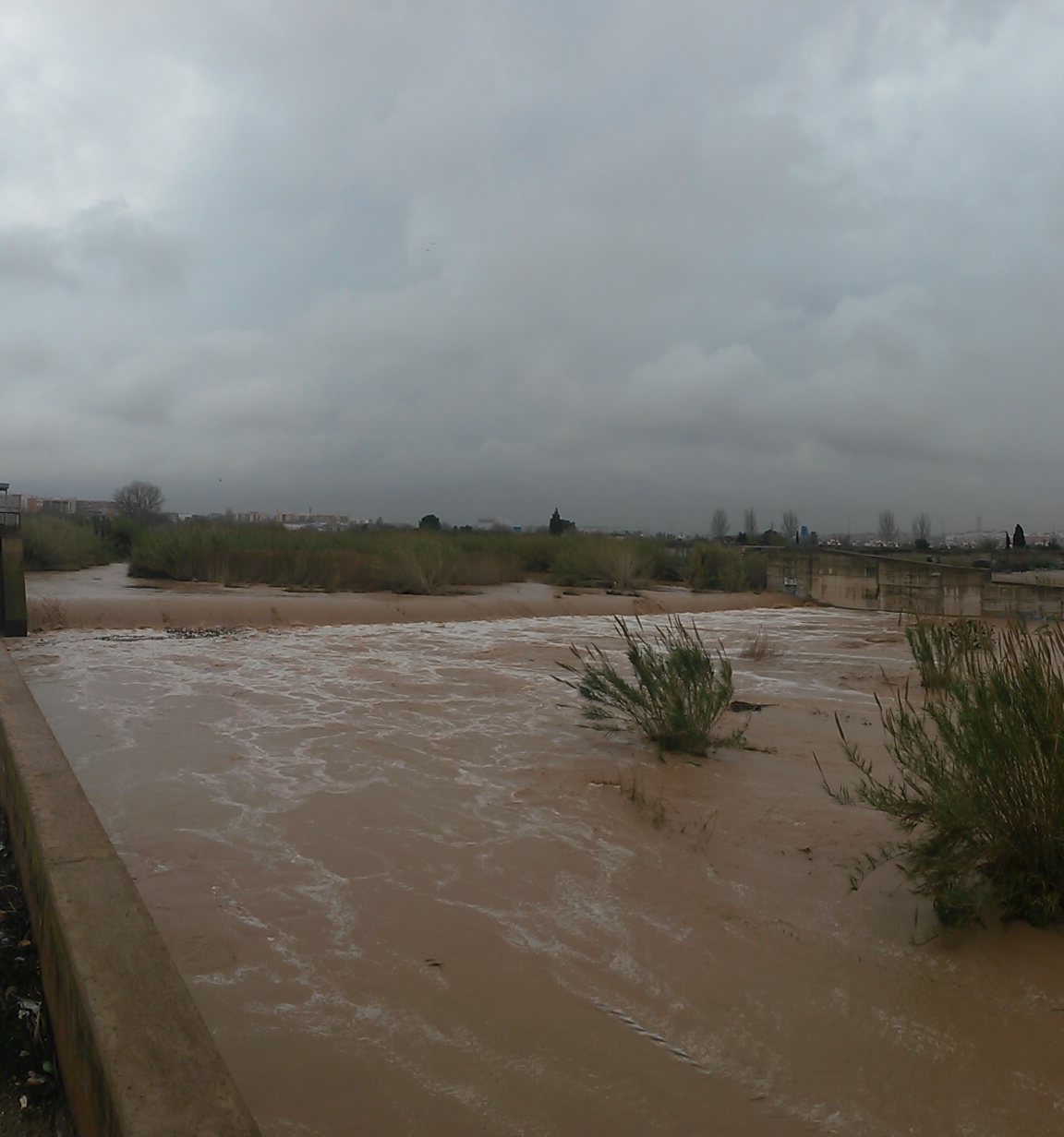 La Cassola o Assud del repartiment a Quart de Poblet. Imatges del Riu Túria al seu pas per Quart de Poblet, preses el 24 de març de 2015